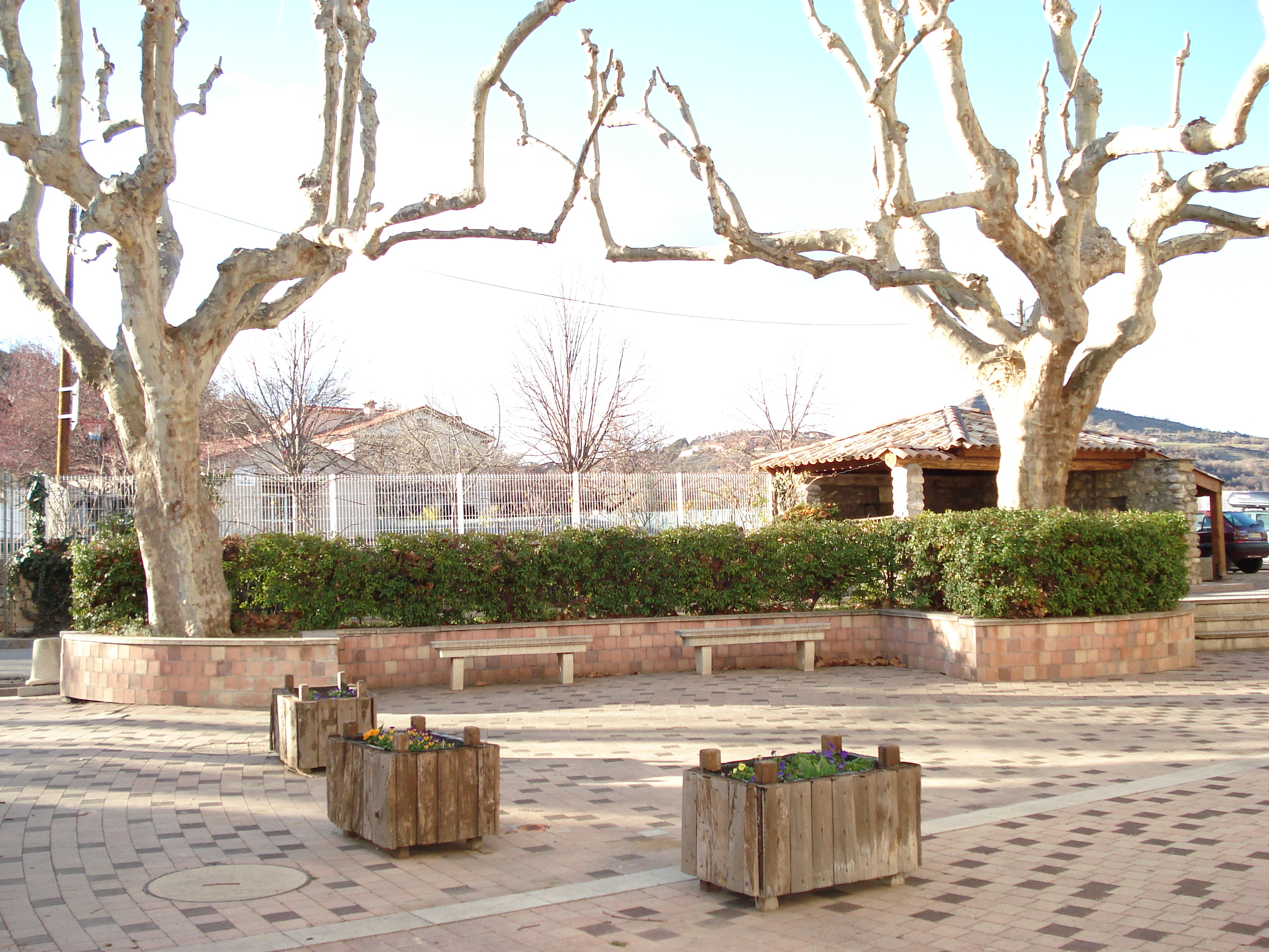 Photo de Champtercier, vue depuis la place devant l'église.